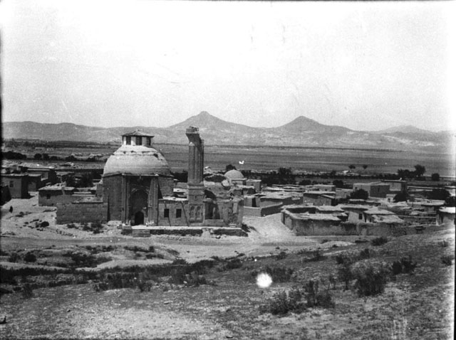 İnce Minareli Medrese